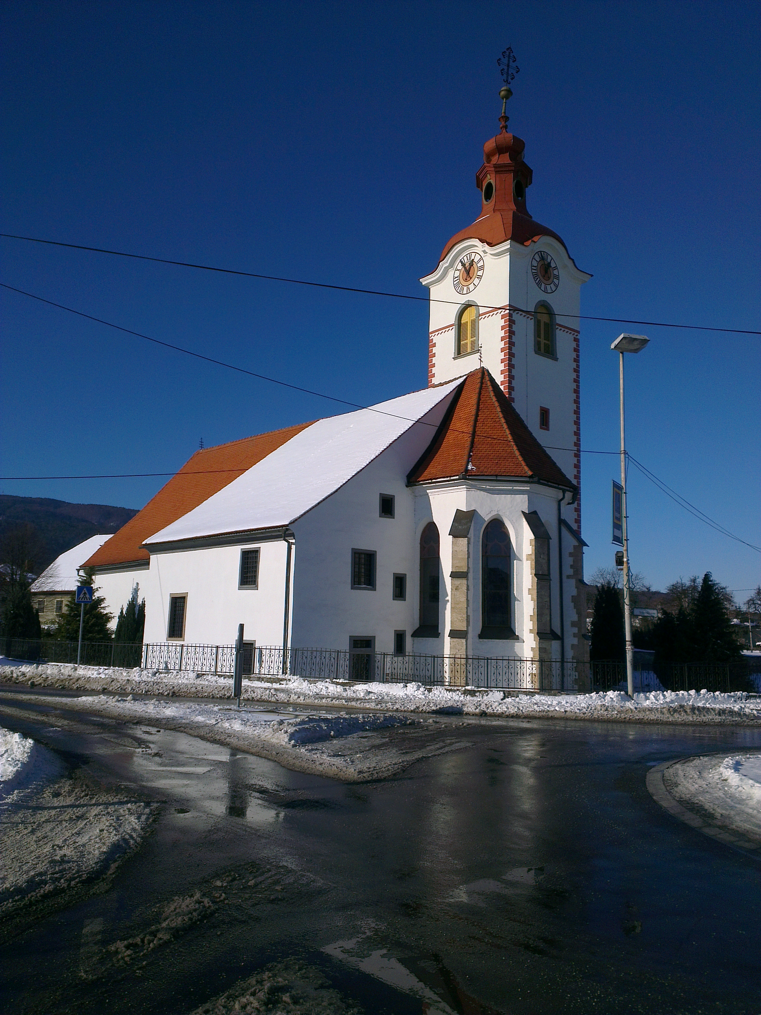 Cerkev Sv. Jurija Hoce